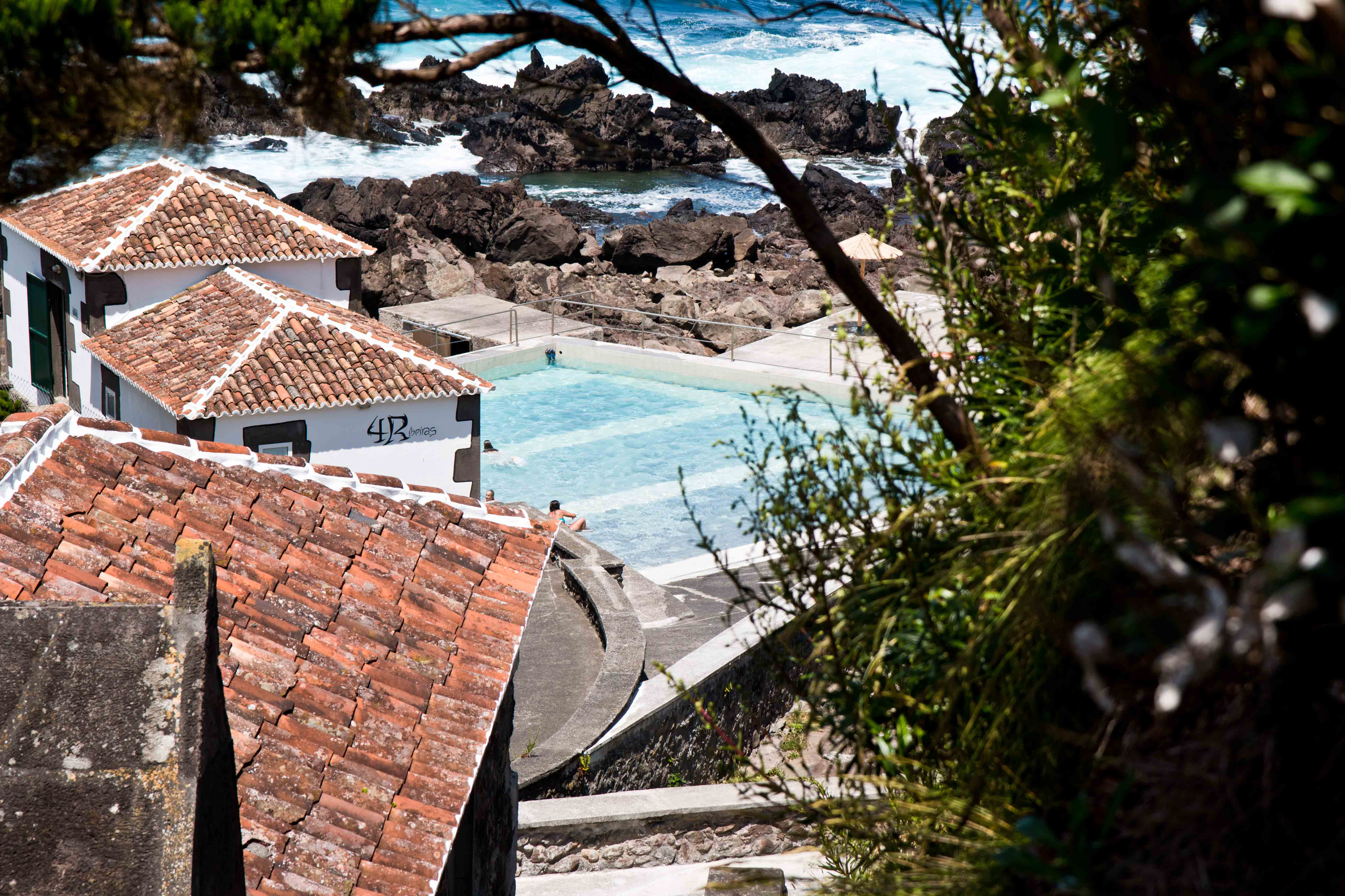 Piscina - Quatro Ribeiras